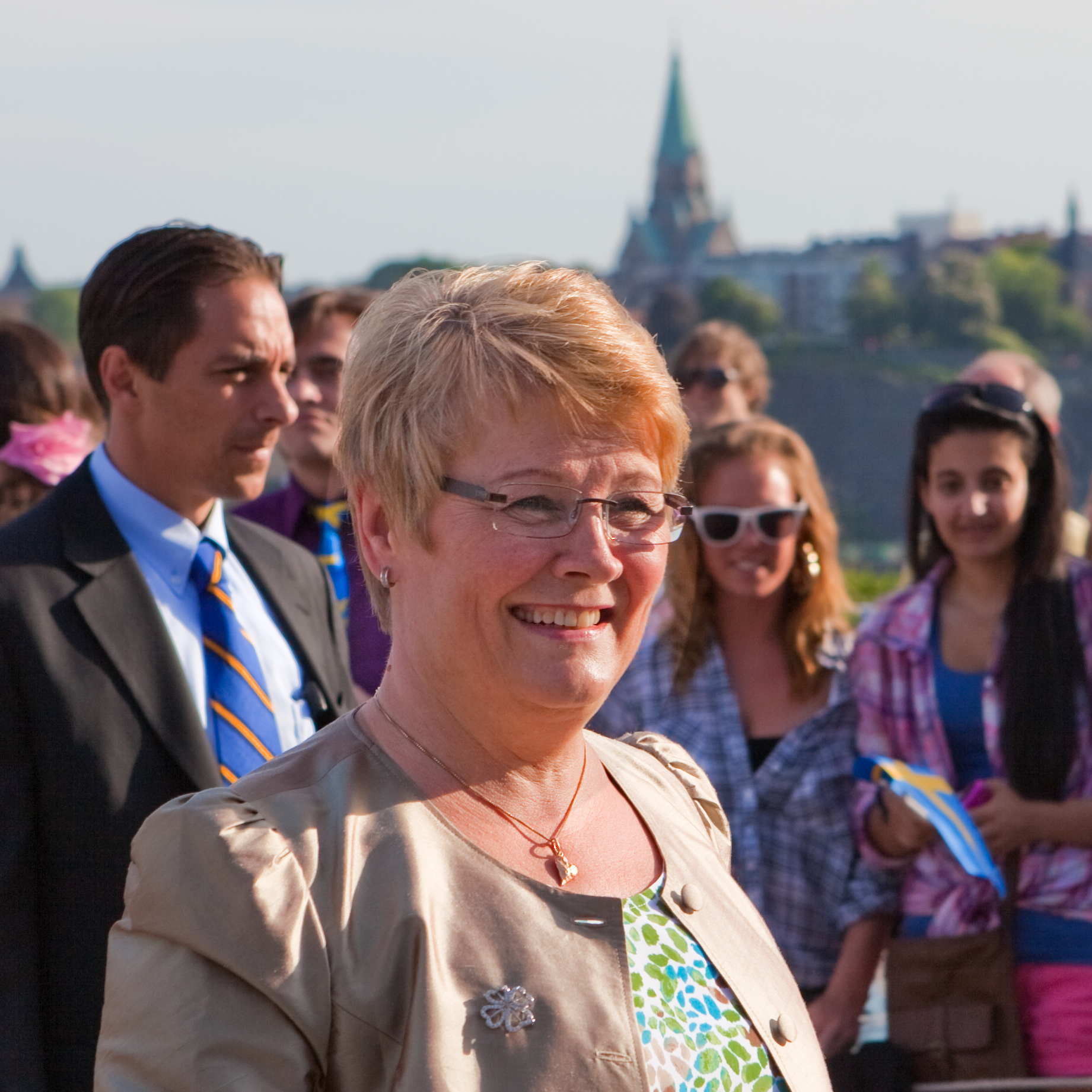 Sveriges Nationaldag 2010, Skansen, Stockholm. Centerpartiledaren Maud Olofsson